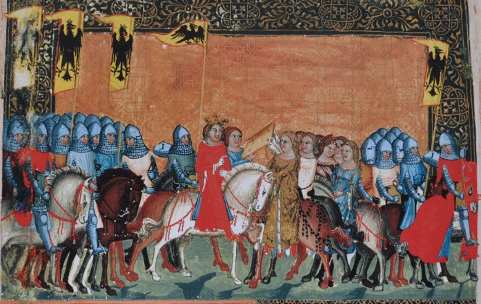 Jitka získává od císaře stolec, aby jej postavila v Boleslavi